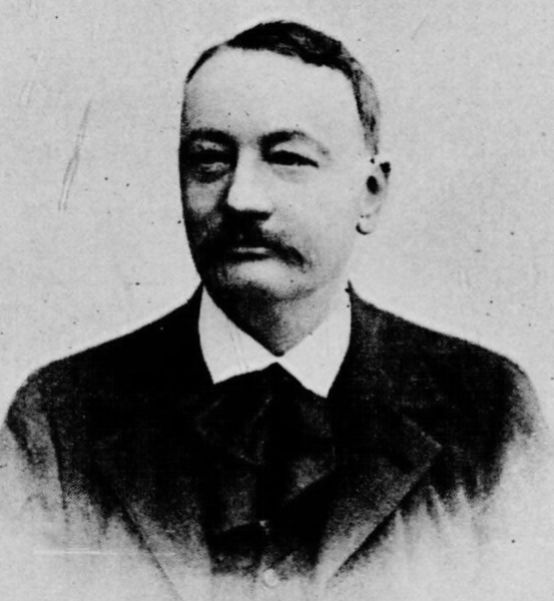 portrait d'Emile Bernard dans l'Annuaire des artistes et de l'enseignement dramatique et musical, 1898